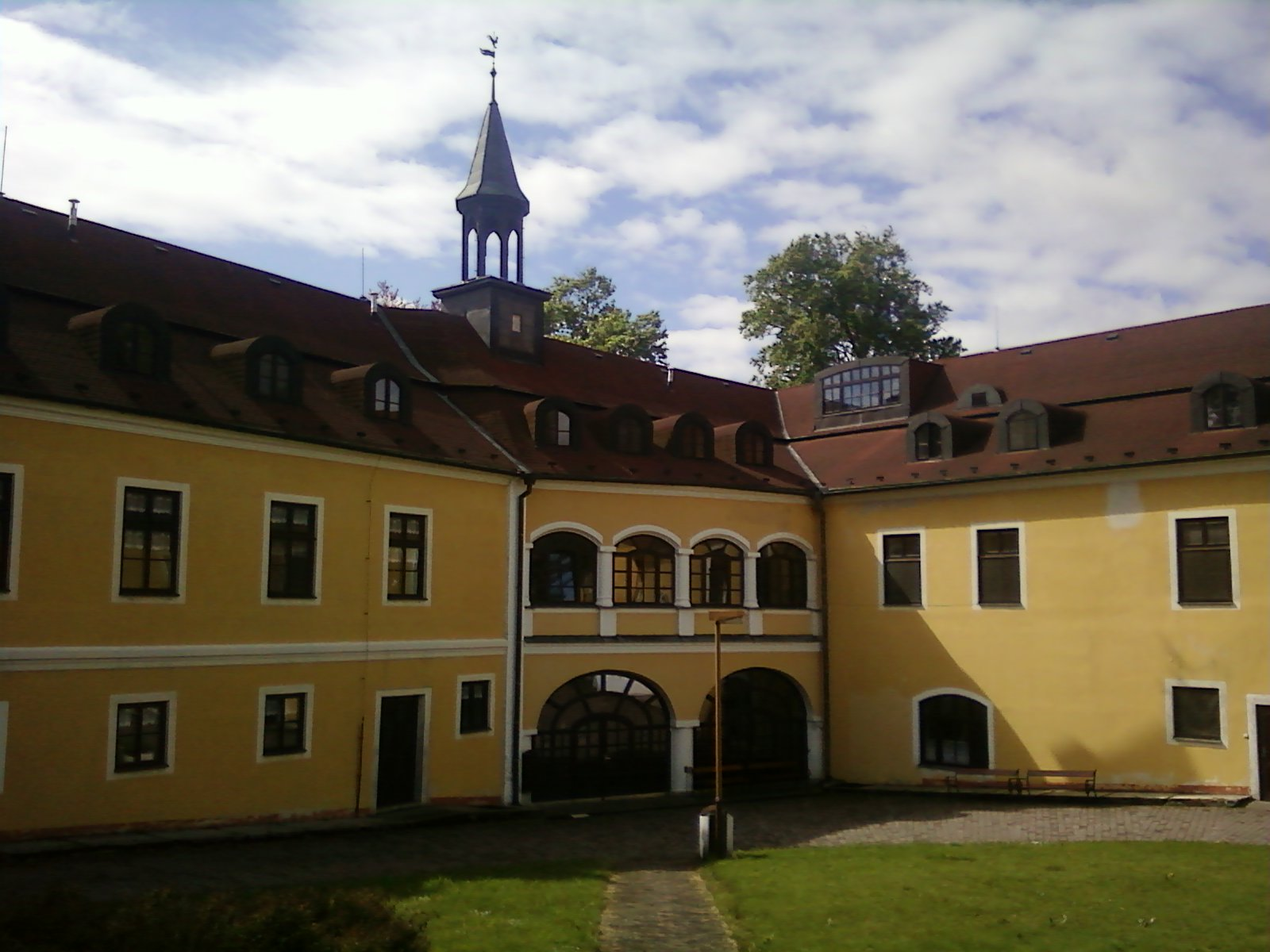 Zámek Proseč u Pošné (stav v roce 2014).